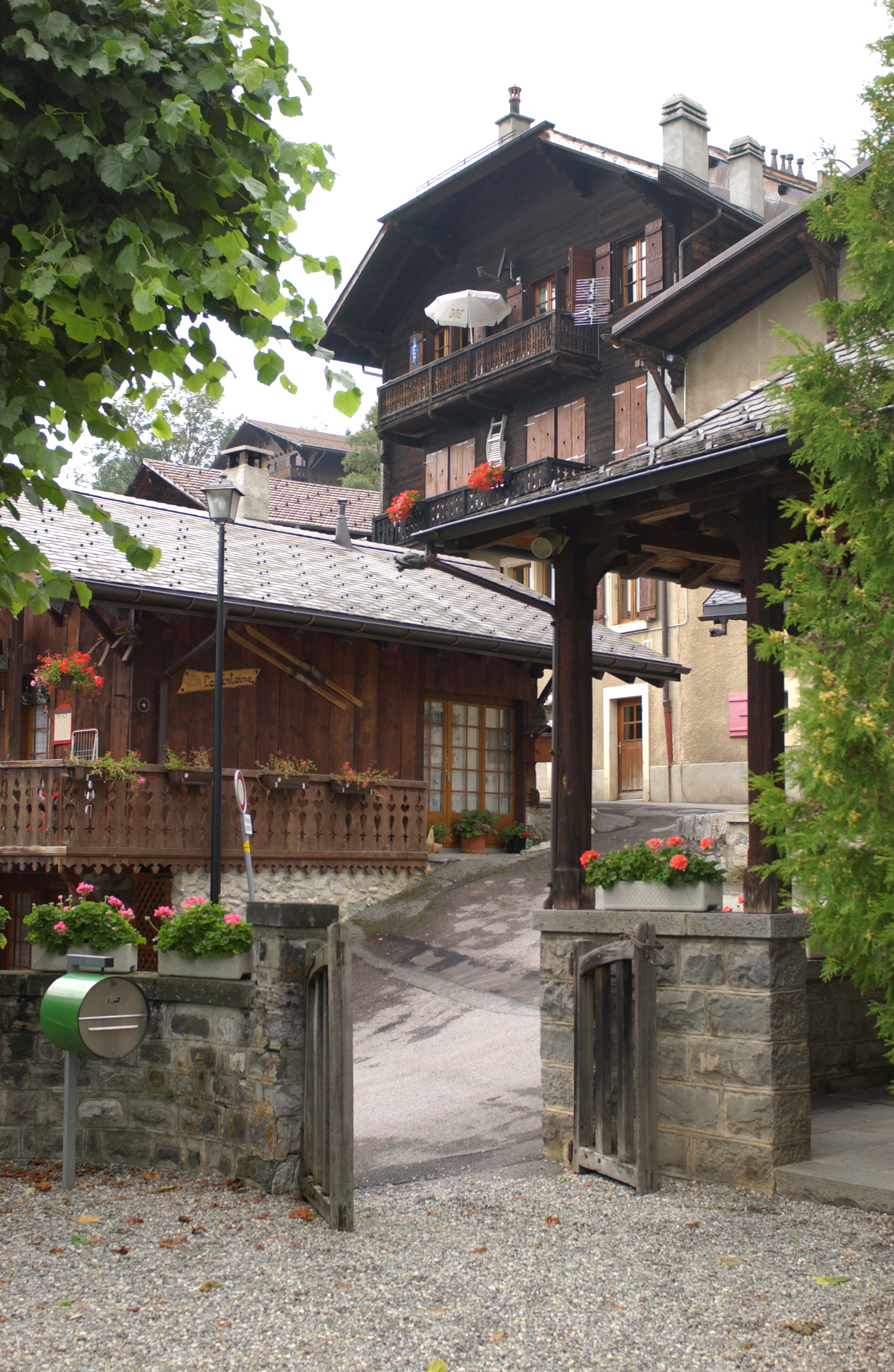 Vue de Gryon (Vaud).